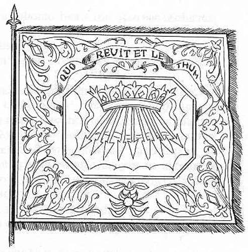 Знамя роты королевских мушкетеров